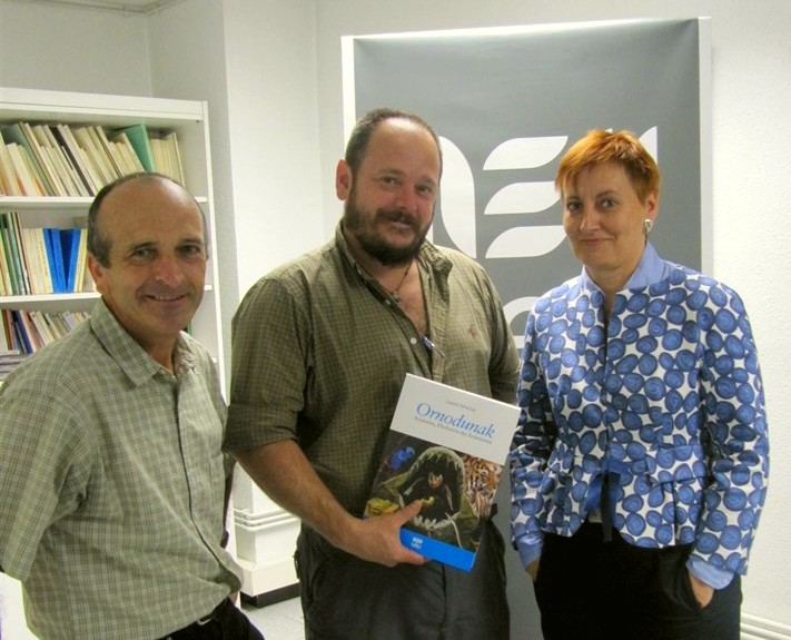 Joserra Aihartza zoologoa 2010ean, Oronodunak liburua aurkeztu zen egunean. UEUko burua zen Lore Erriondorekin eta Joserra Etxebarria testu-orraztailearekin.